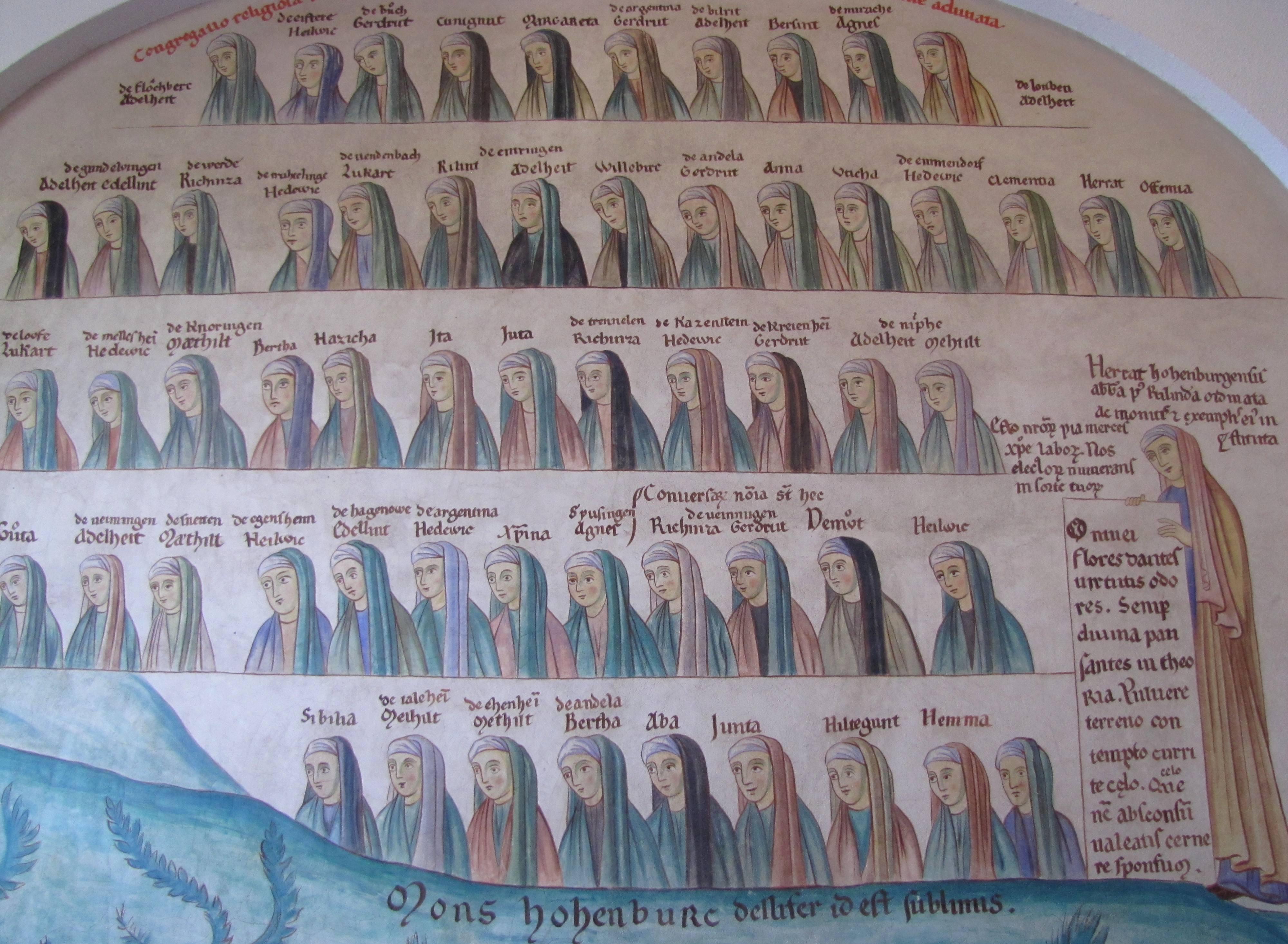 Alsace, Bas-Rhin, Ottrott, Couvent du Mont Sainte-Odile (PA00084884, IA00075612): Peinture murale "Moniales du St Odile" (XXe).